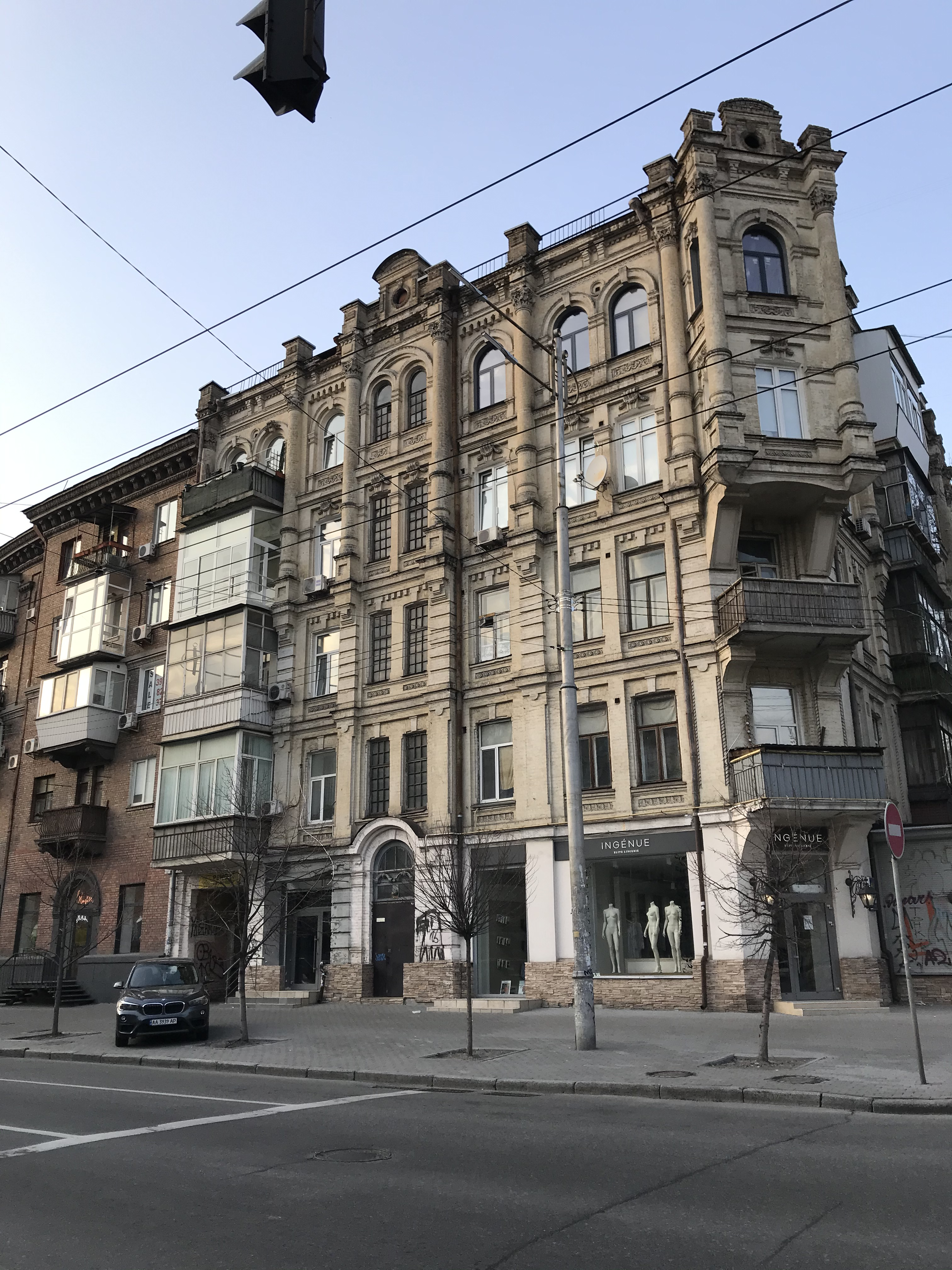 Тарасівська вул., 40/52